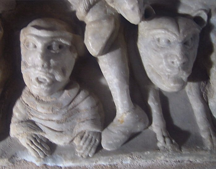 Detalle del sarcófago en mármol atribuido al Maestro de Cabestany (Abadía de Saint-Hilaire)